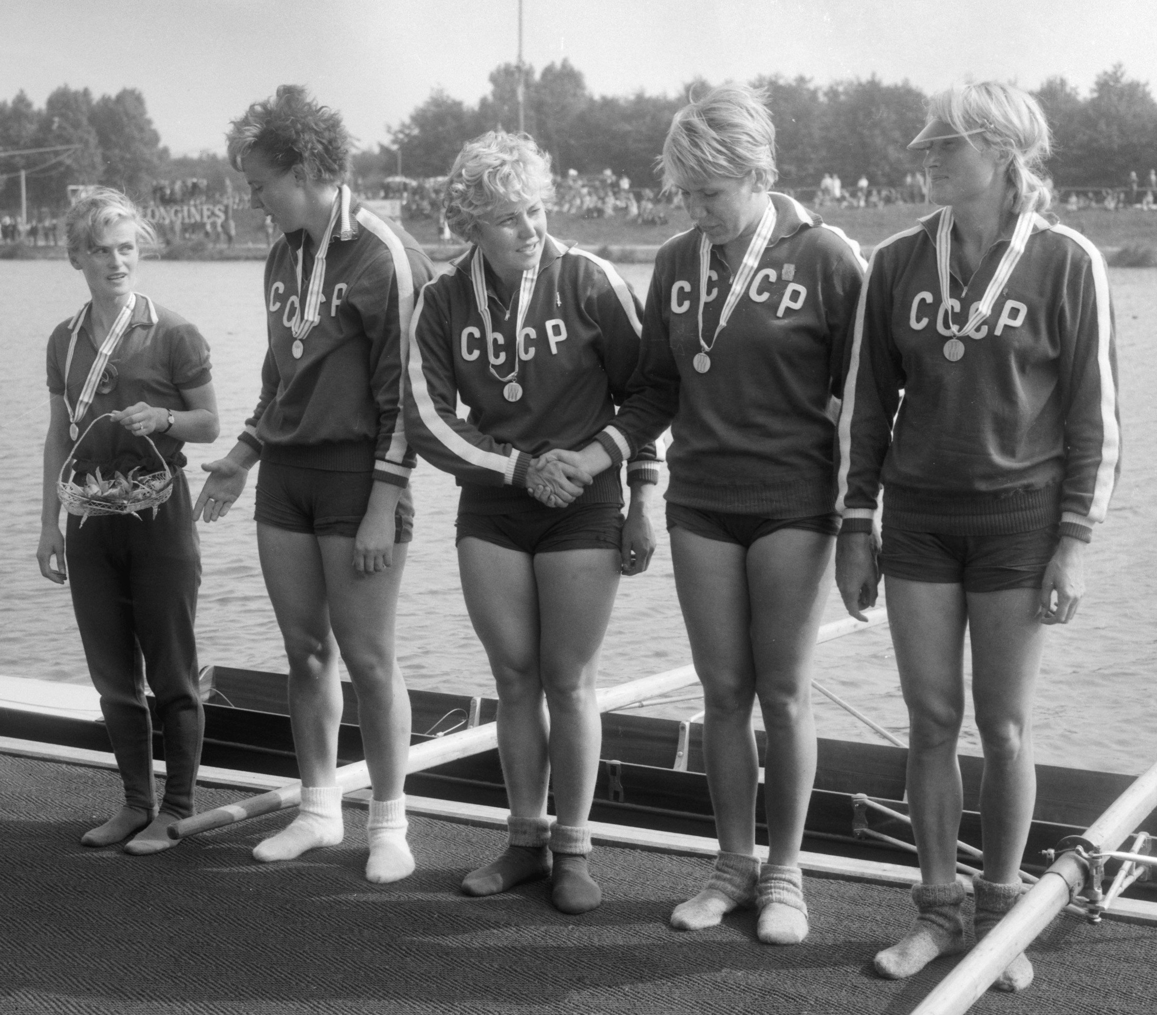 Europese Roeikampioenschappen dames 1966 op de Bosbaan in Amsterdam. Huldiging van de Russische vier met stuurvrouw